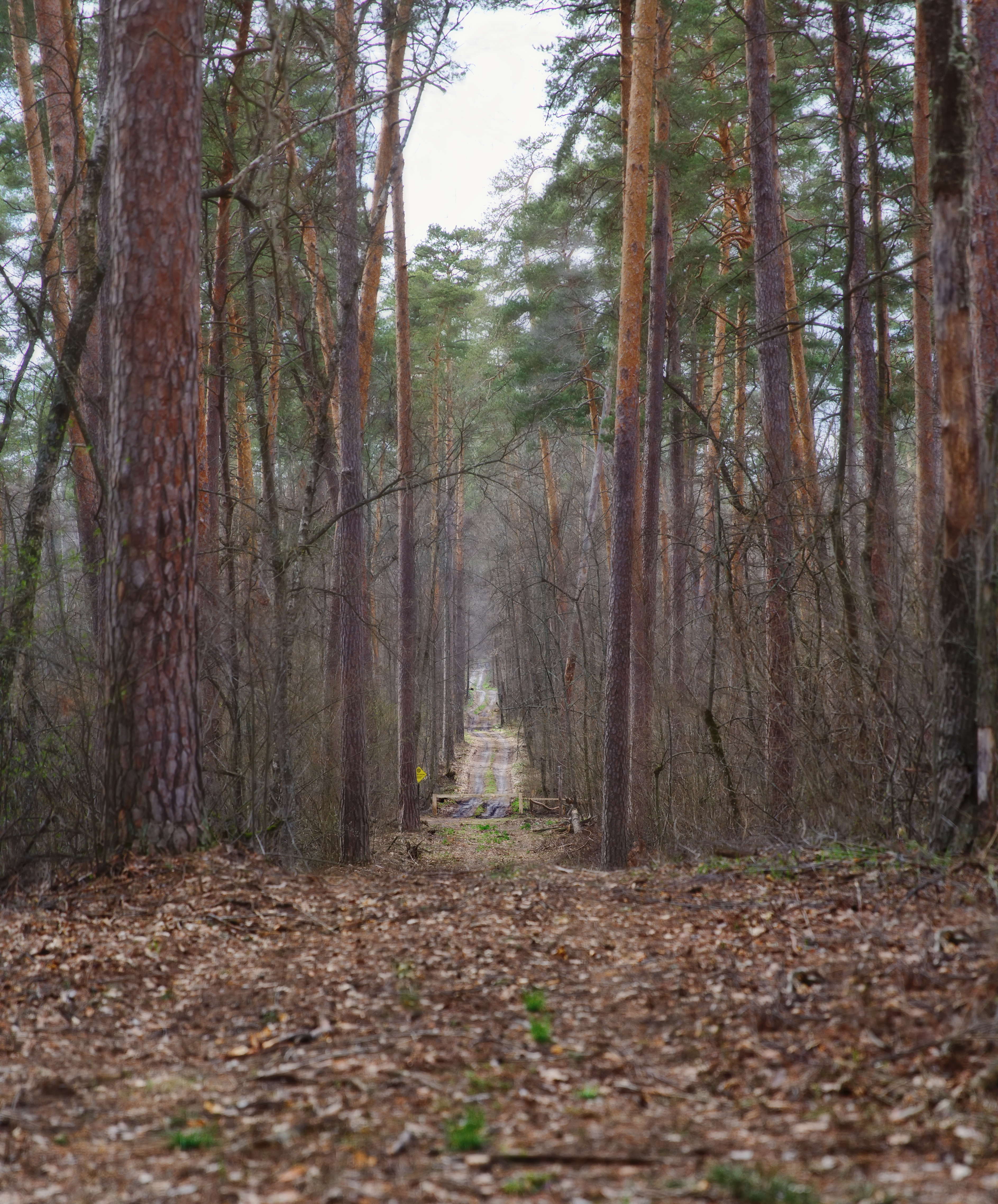 Воронежский заповедник: Территория заповедника расположена на границе Воронежской (Верхнехавский р-н) и Липецкой (Усманский р-н) областей и занимает северную половину островного лесного массива – Усманского бора., Верхнехавский район, Воронежская область This image is related to the protected area of Russia number 3600069